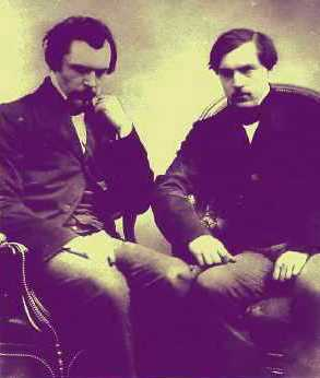 Edmond de Goncourt (à gauche) et Jules de Goncourt (à droite) pris en photo par Félix Nadar